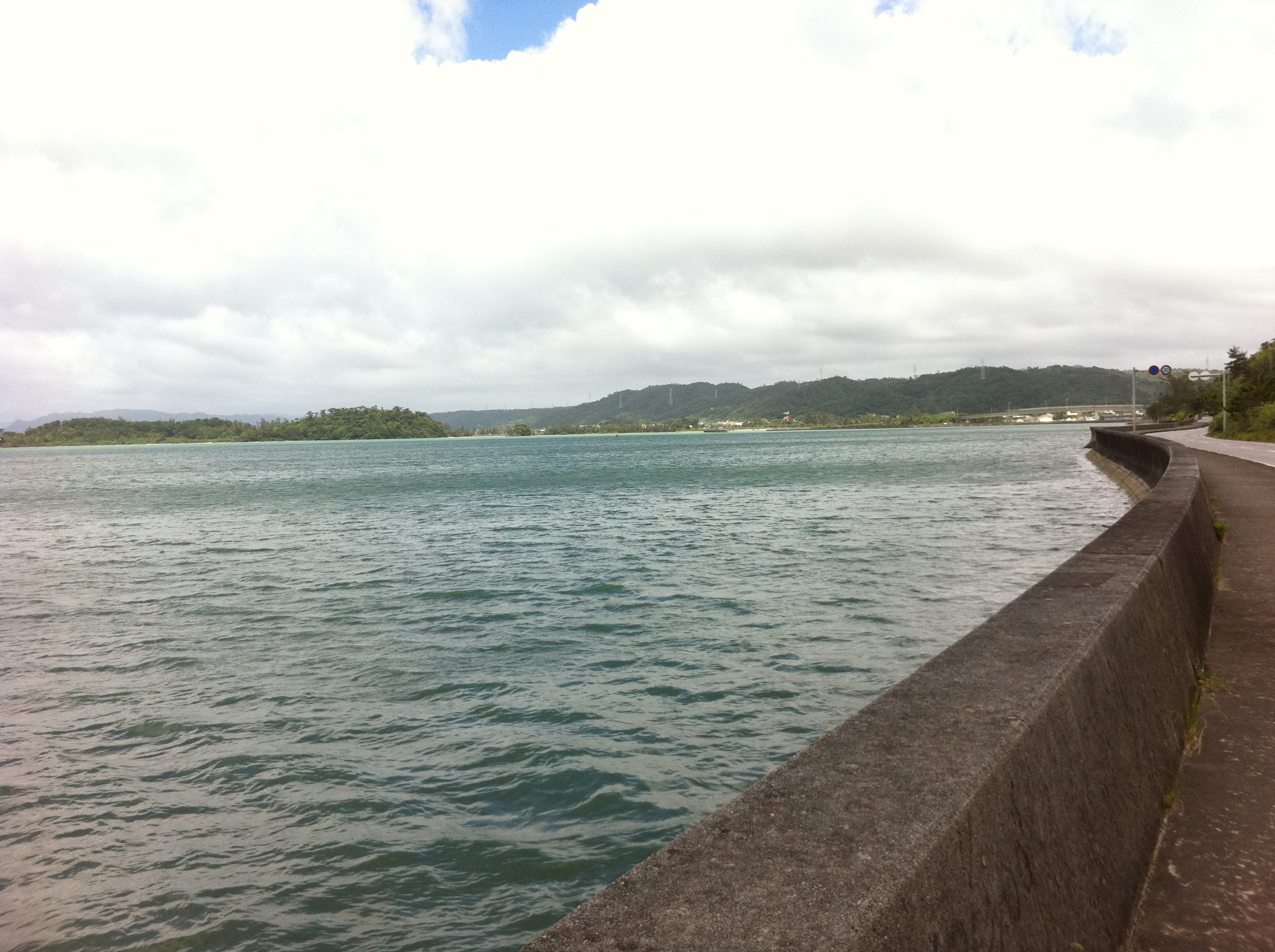 Nakao, Nago, Okinawa Prefecture 905-1153, Japan